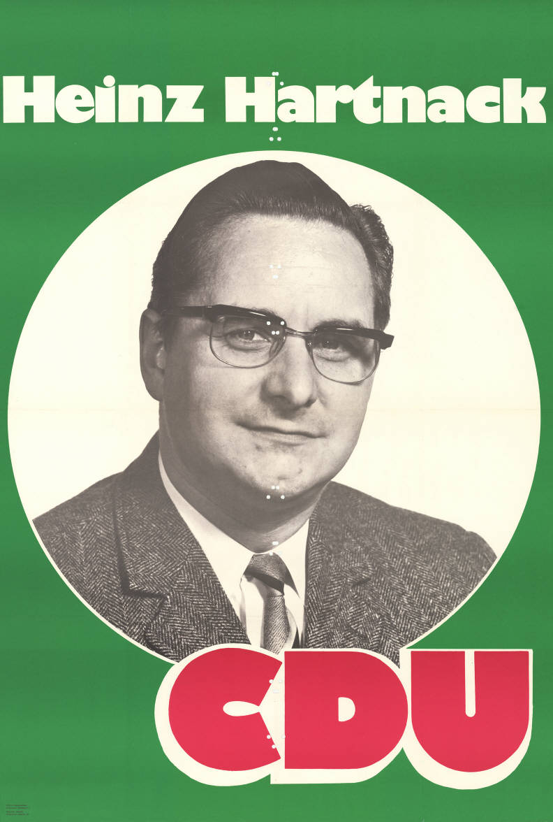 Heinz Hartnack CDUAbbildung:PorträtfotoPlakatart:Kandidaten-/Personenplakat mit PorträtAuftraggeber:CDU in Niedersachsen, HannoverDrucker_Druckart_Druckort:Gebrüder Jänecke, HannoverObjekt-Signatur:10-008 : 313Bestand:Landtagswahlplakate Niedersachsen (10-008)GliederungBestand10-18:Landtagswahlplakate Niedersachsen (10-008) » CDULizenz:KAS/ACDP 10-008 : 313 CC-BY-SA 3.0 DE